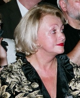 Зрительный зал - церемония вручении премии "Хрустальная турандот"